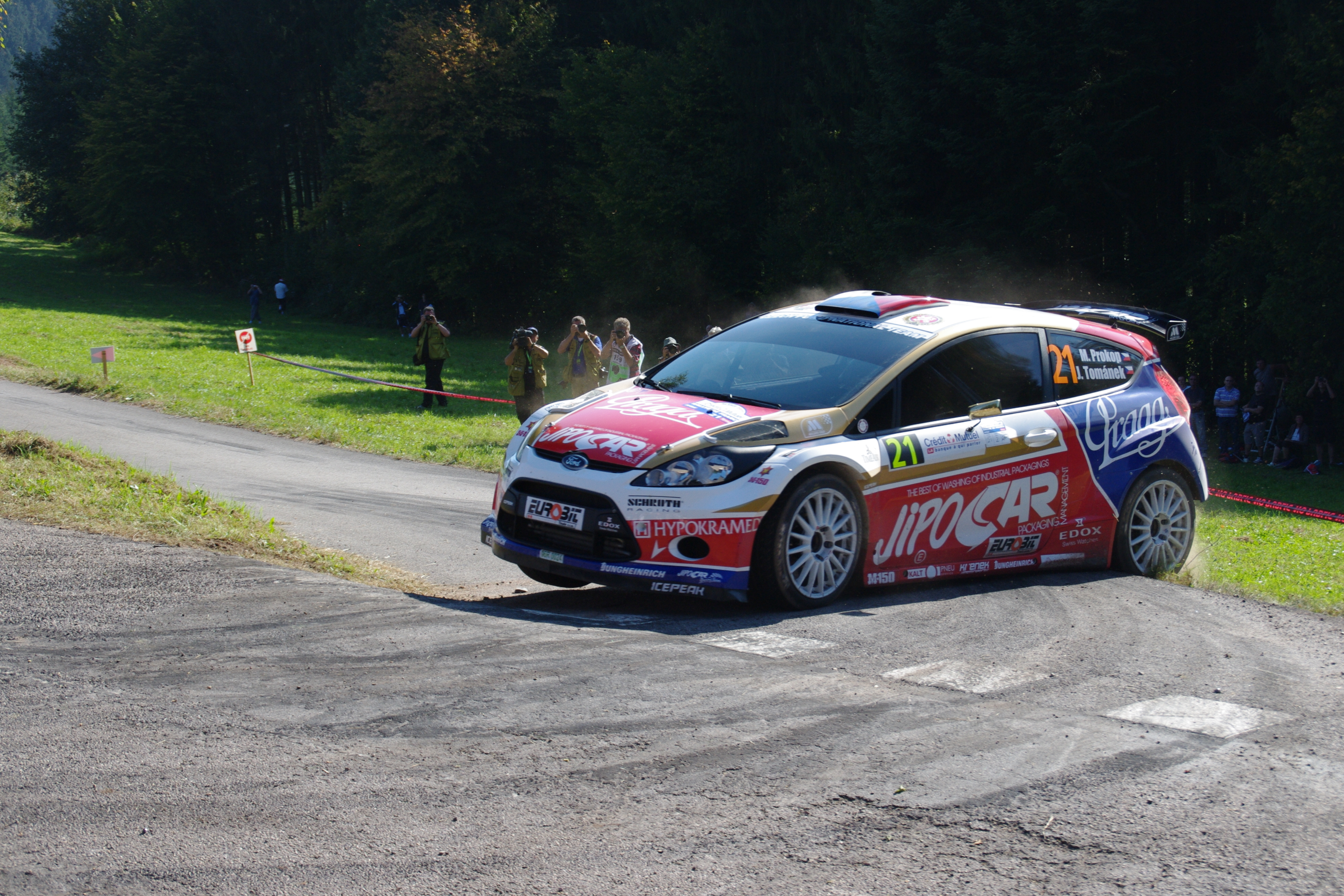 Martin Prokop - Rallye de France 2011